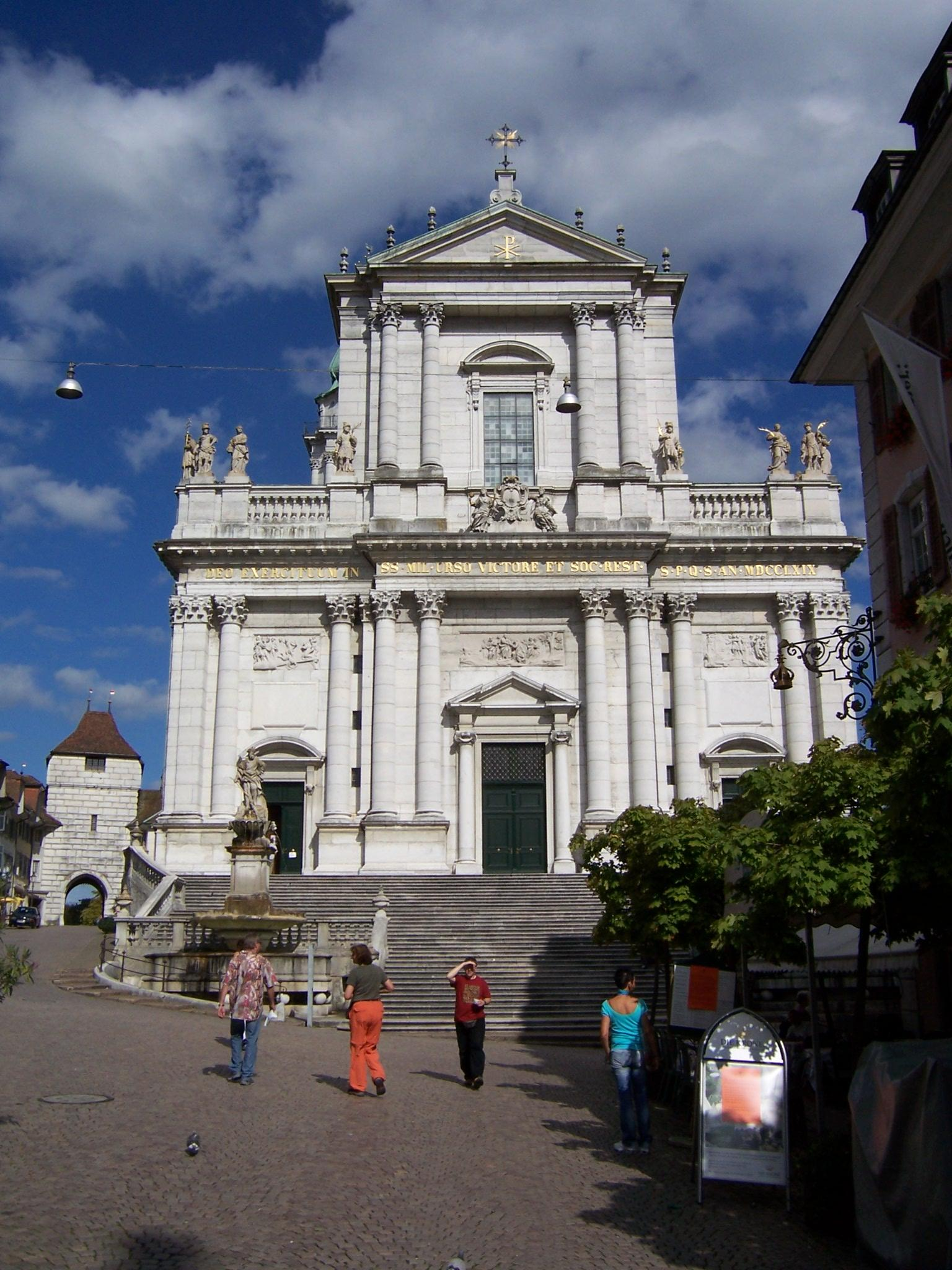 St.-Ursen-Kathedrale in Solothurn (Kanton Solothurn, Schweiz) eigene Aufnahme vom 4. September 2006